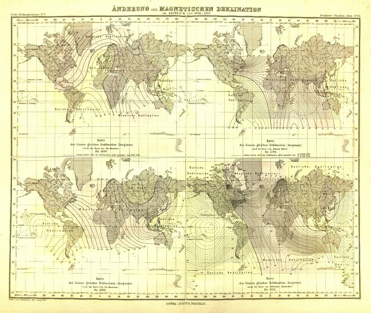 Atlas des Erdmagnetismus, Gotha: Justus Perthes, 20 S., 5 Karten (pdf 99 MB) - No. V, Änderungen der Magnetischen Deklination